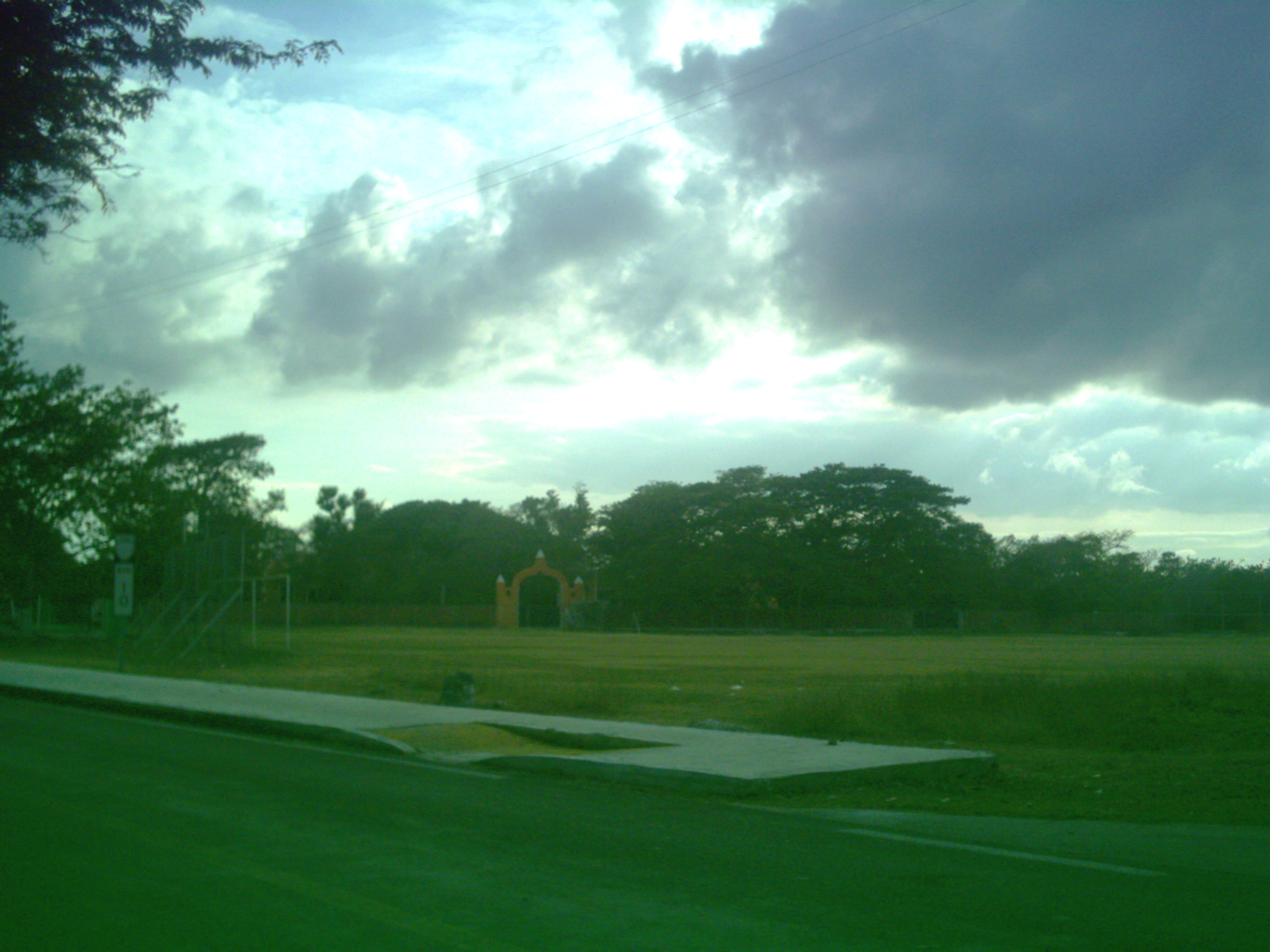 Parque principal de Noc Ac, Yucatán.